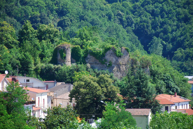 Ruderi del castello normanno di Fossaceca del XII secolo, Terranova di Arpaise (BN)